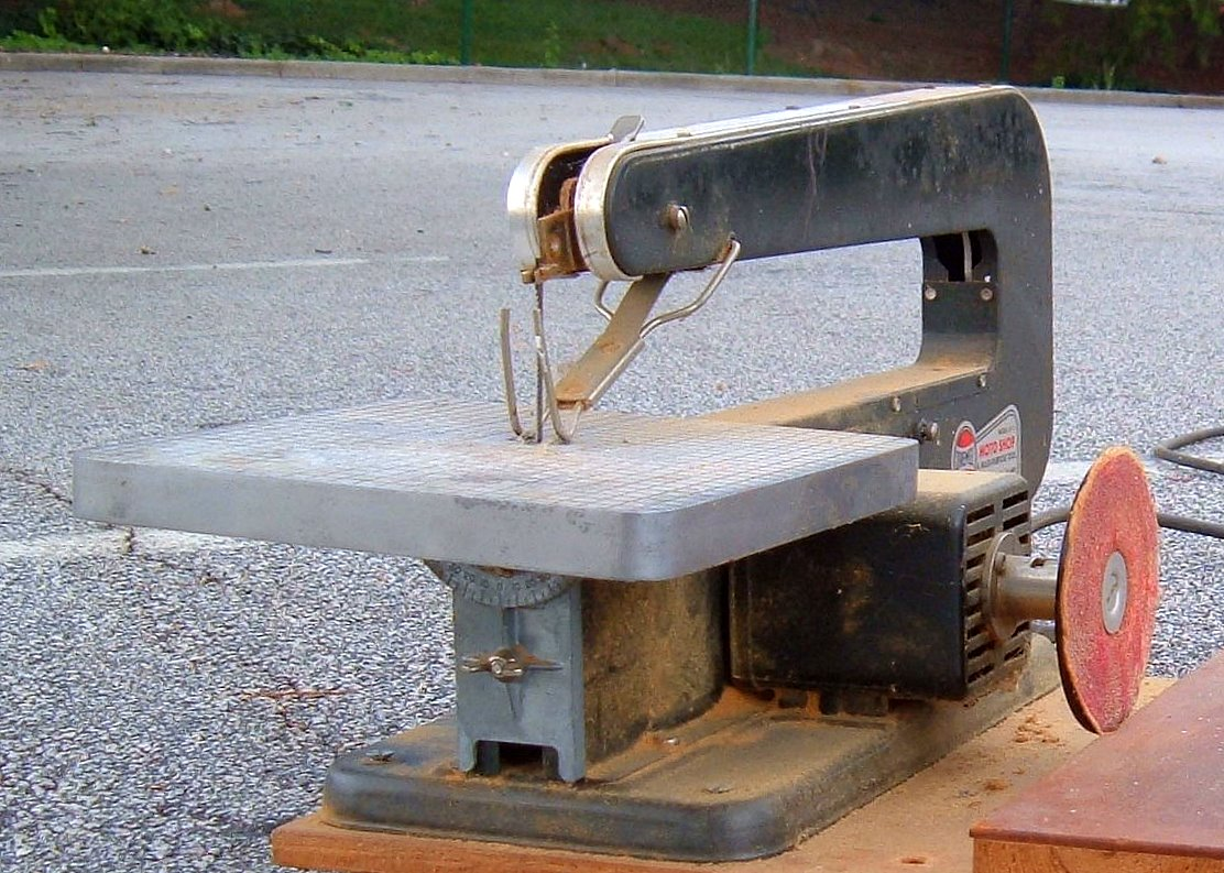 Dremel scroll saw